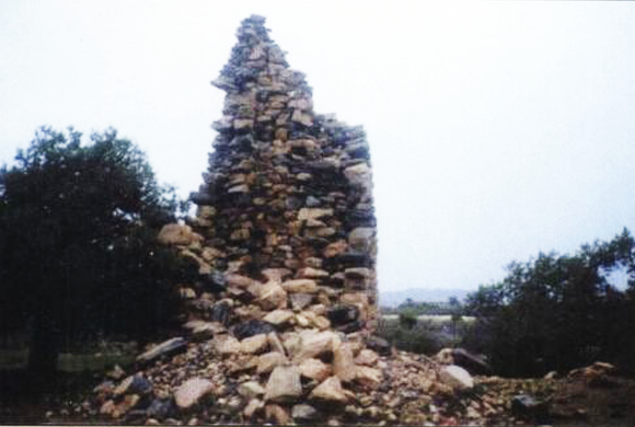 حصون بلاد قبيلة حوالة